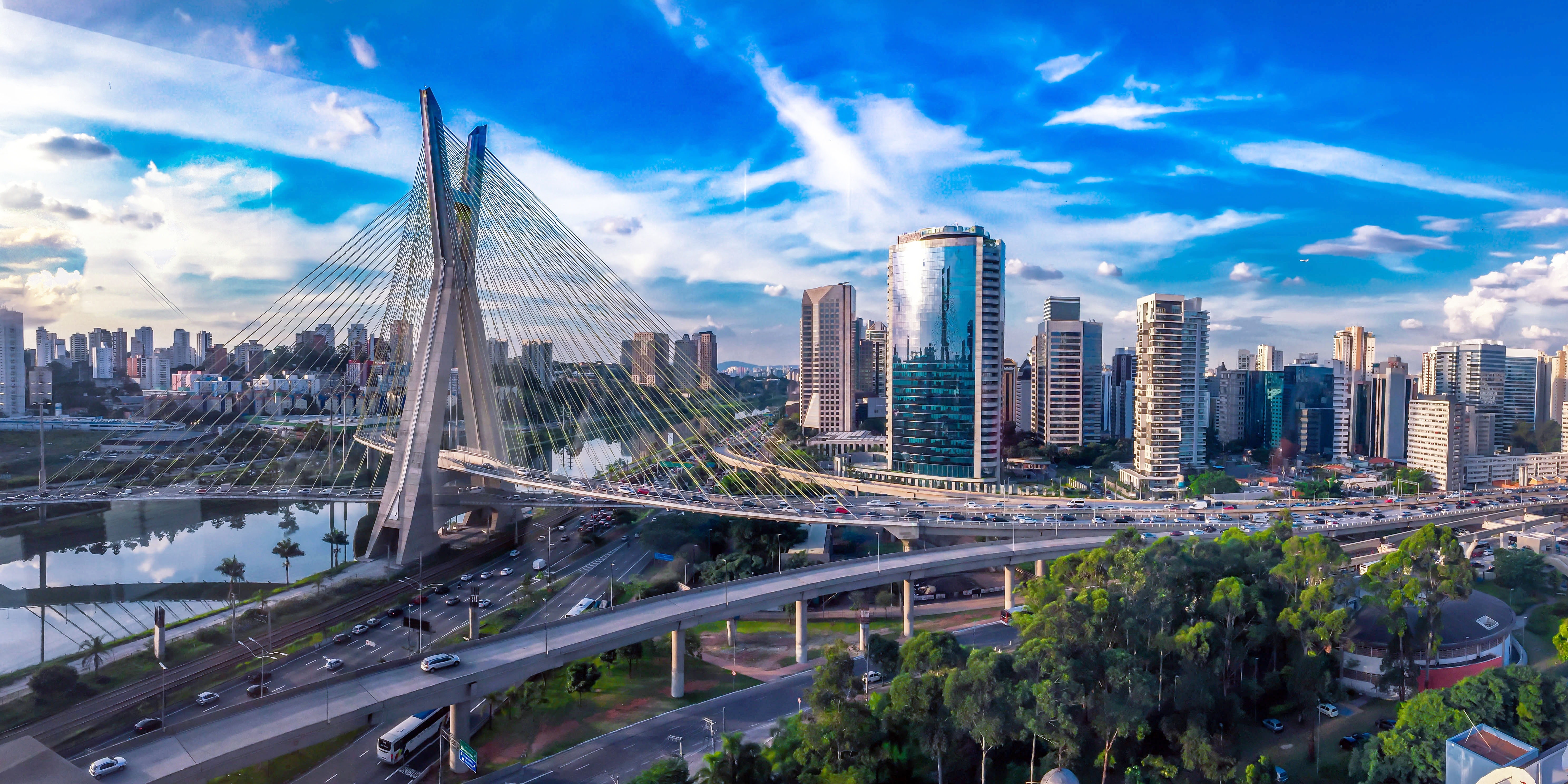 Ponte Octávio Frias de Oliveira e Centro Empresarial Nações Unidas (CENU).